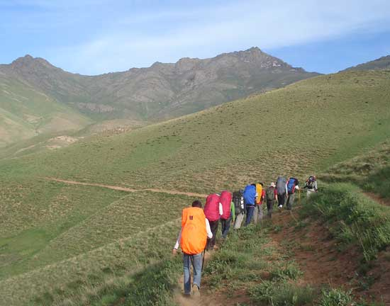 مسير صعود به چهل چشمه از كاني چاوره ش